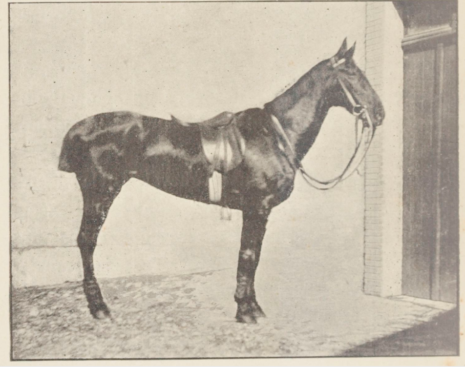 Jument près du sang. Ida, pas fataliste, pur sang, et une jument de demi-sang. Née en 1886, chez M. Olry, à Saint-Léonard-des-Parcs (Orne).